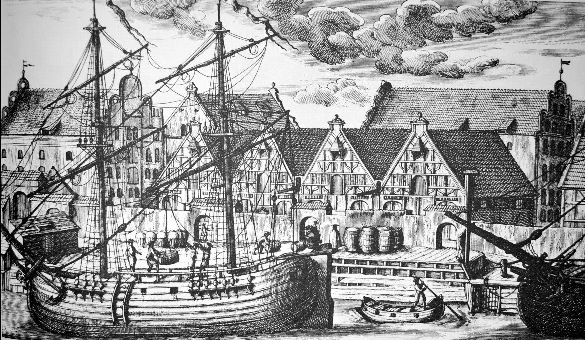 Wyspa Spichrzów w Gdańsku, w drugiej połowie XVIII wieku.